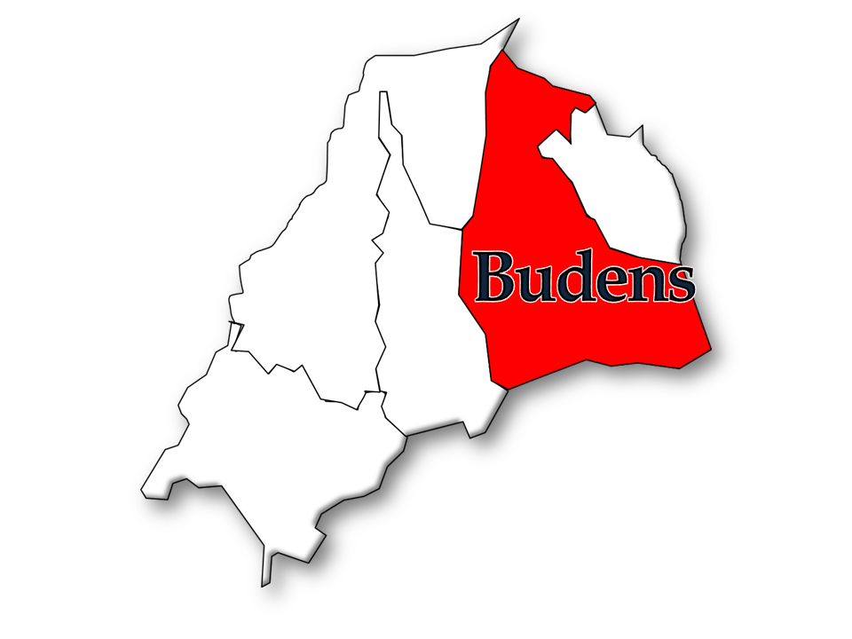 Censos 1864/2011